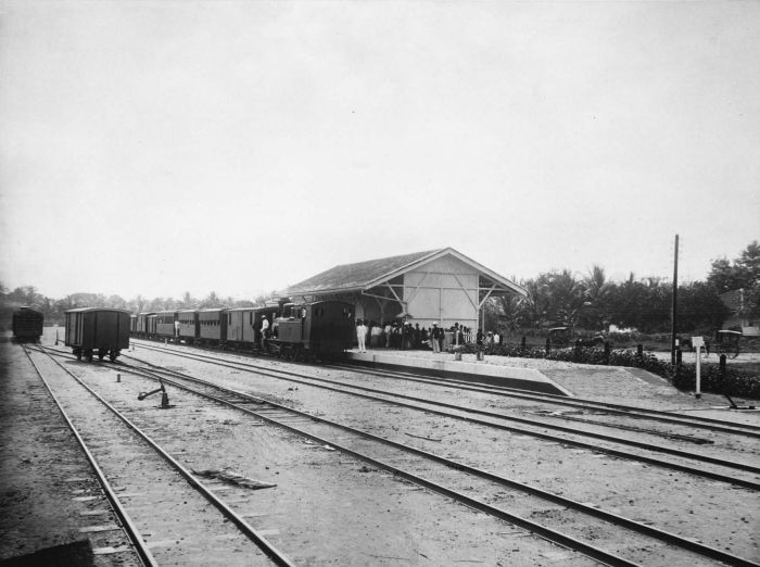 Foto. Station Selesseh met wachtende mensen en een binnenkomende trein